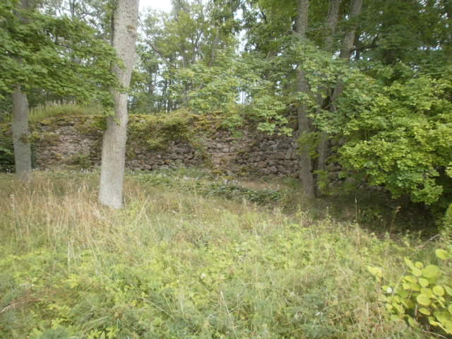 Mantelringmüüri kagunurk.